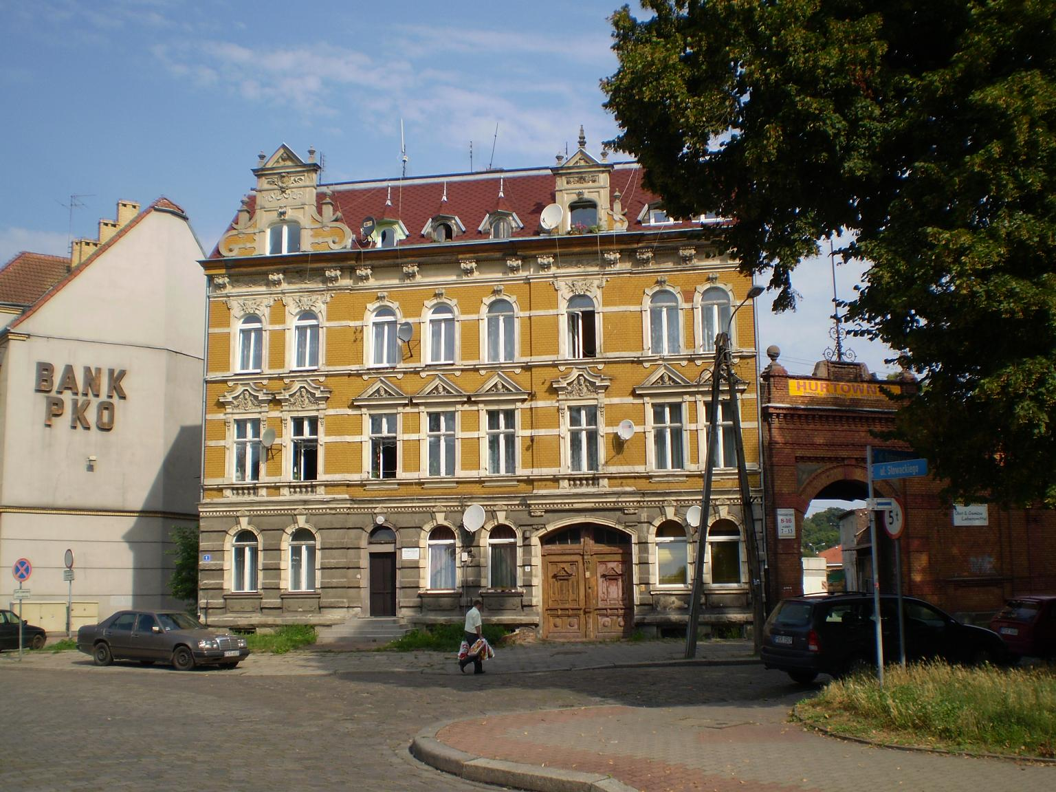 Gubin, ul. Generała Jana Henryka Dąbrowskiego 1 - kamienica, 3-4 ćw. XIX wieku